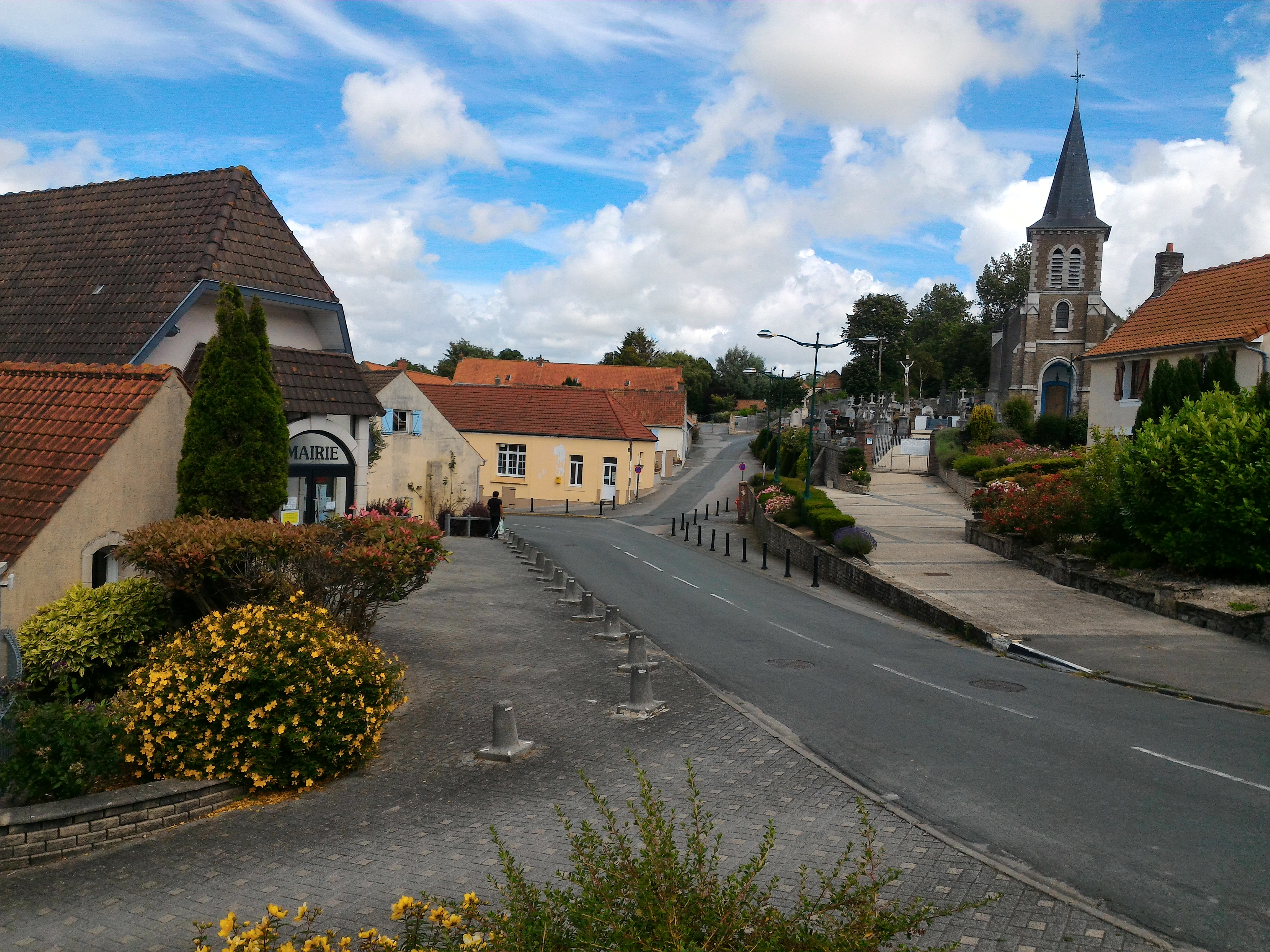 Village de Nesles, Pas-de-Calais, nord de la France